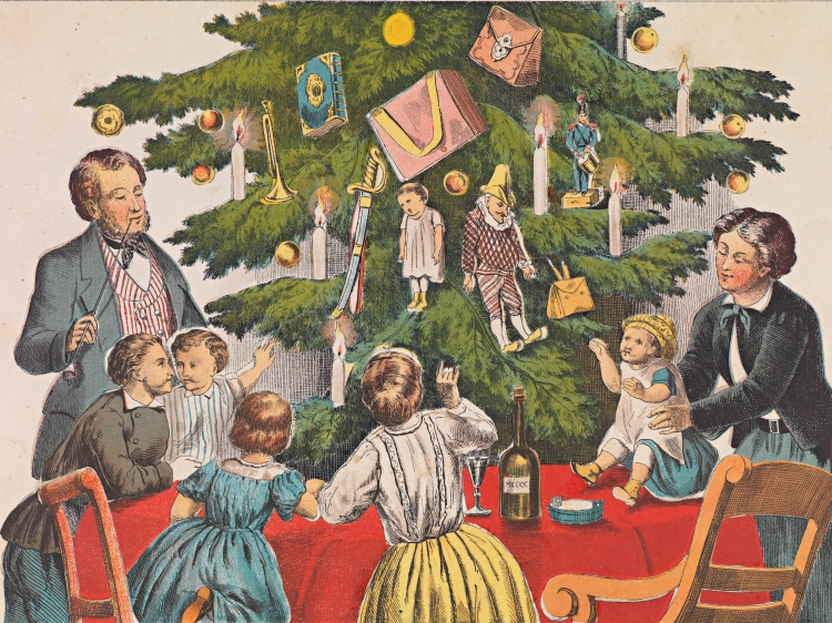 Gezin bij de kerstboom. Uit: Een nuttig en prettig boek voor kinderen: plakalbum met platen om uit te knippen, ca. 1860. Signatuur: BJ Z085, plaat 2.